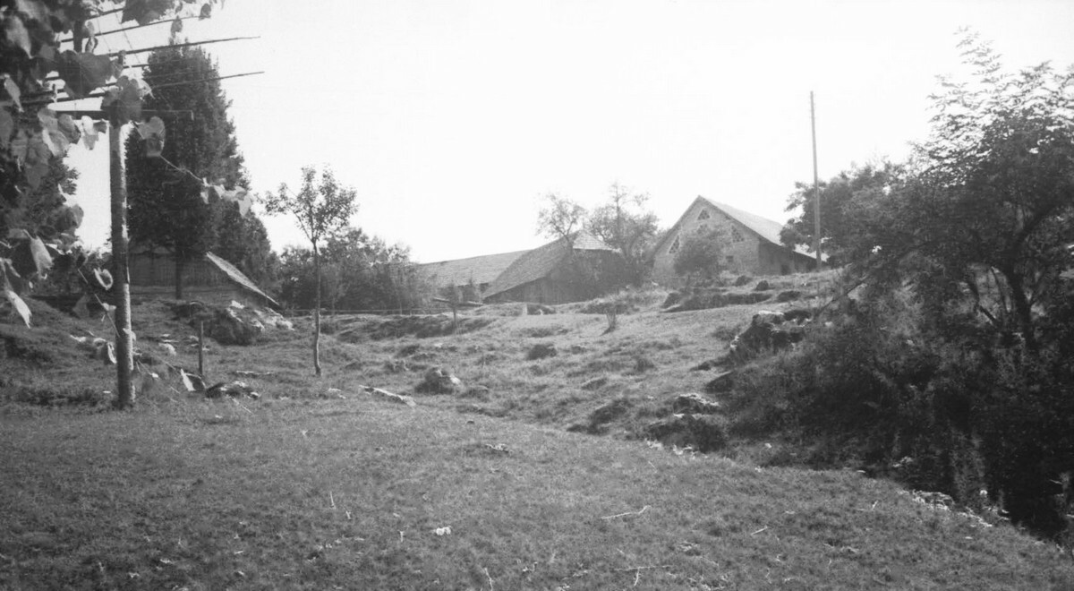 Vas Pece.